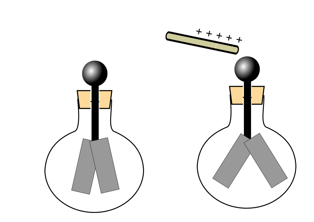 Electrifización por contacto